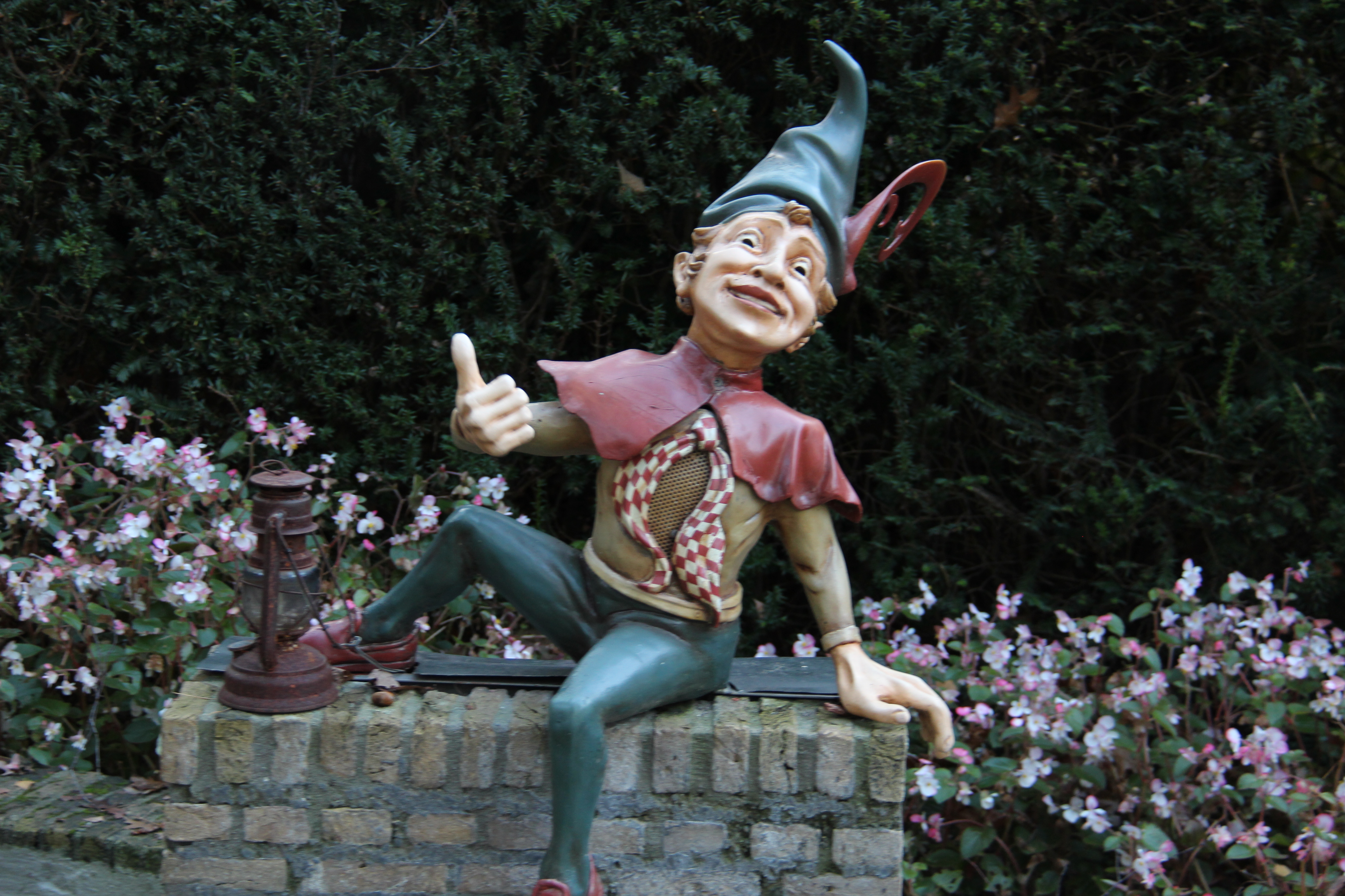 Kleine Boodschap in het sprookjesbos